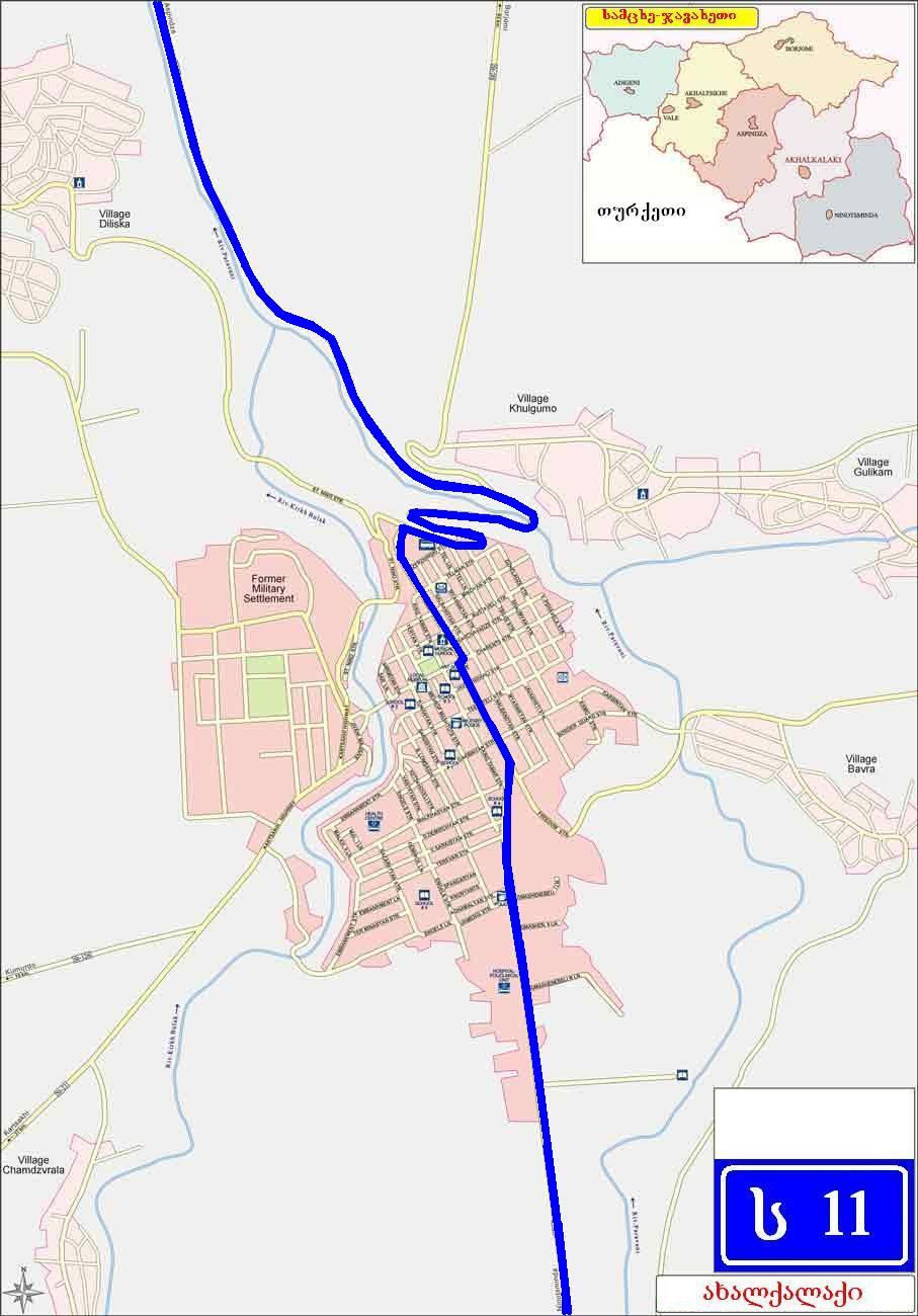 საქართველოს საავტომობილო მაგისტრალი ს11 ახალქალაქში